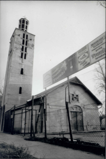 A Vajda Péter utcai (Lux-féle) torony revitalizációjából. A torony és az üdítőraktárnak használt templomépület.